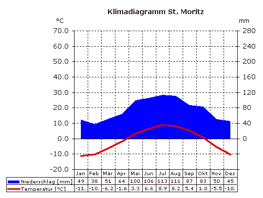 Klimadiagramm St. Moritz